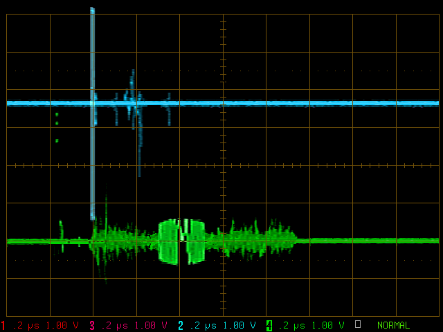 Oszillogramm eines klassisch kurzen Sendeimpulses (hellblau) und ein modulierter langer Sendeimpuls (grün)